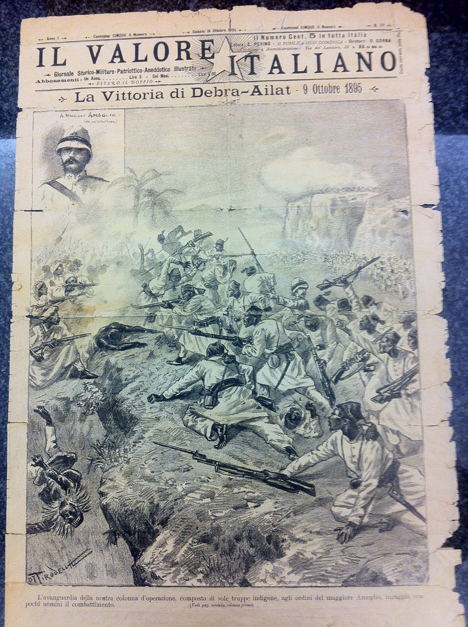 La vittoria di Debra-Ailat, 9 ottobre 1895. Il Valore Italiano N.46